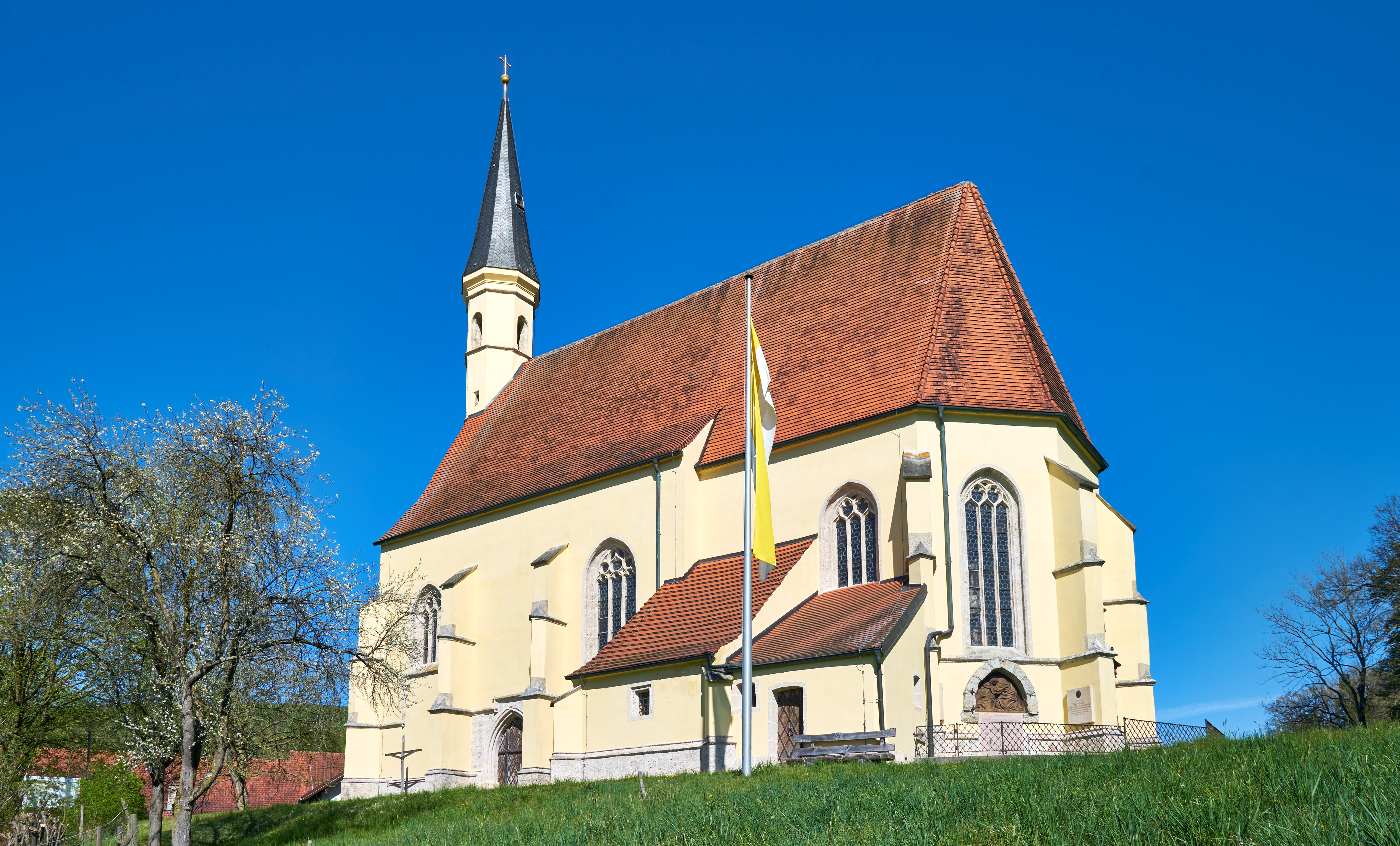 Katholische Wallfahrtskirche St. Anna, einschiffiger spätgotischer verputzter Tuffquaderbau mit westlichem Dachreiter, von 1520/21; mit Ausstattung.